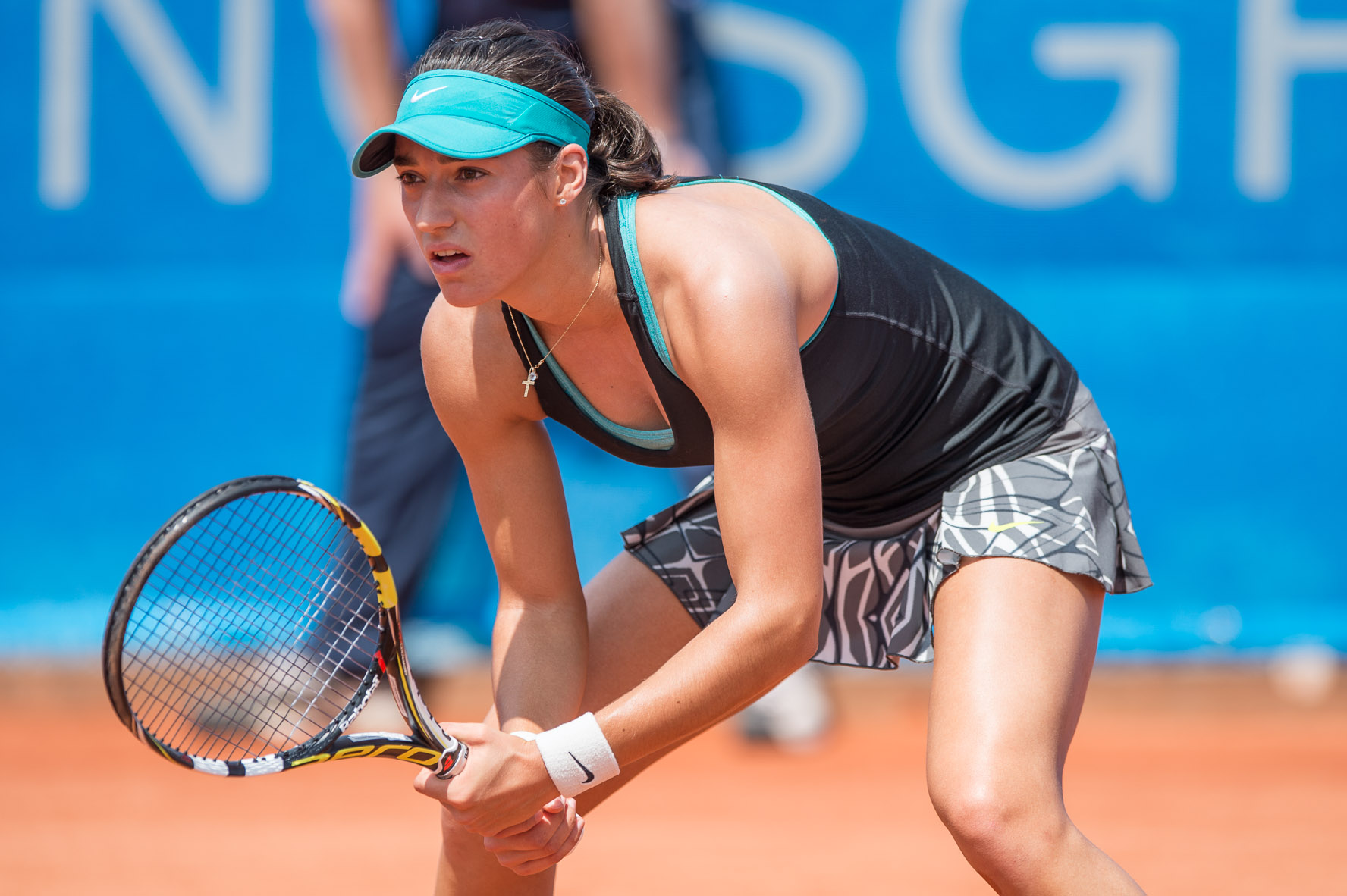 Caroline Garcia,Damentennis,Nürnberger Versicherungscup 2014,Tennis,WTA